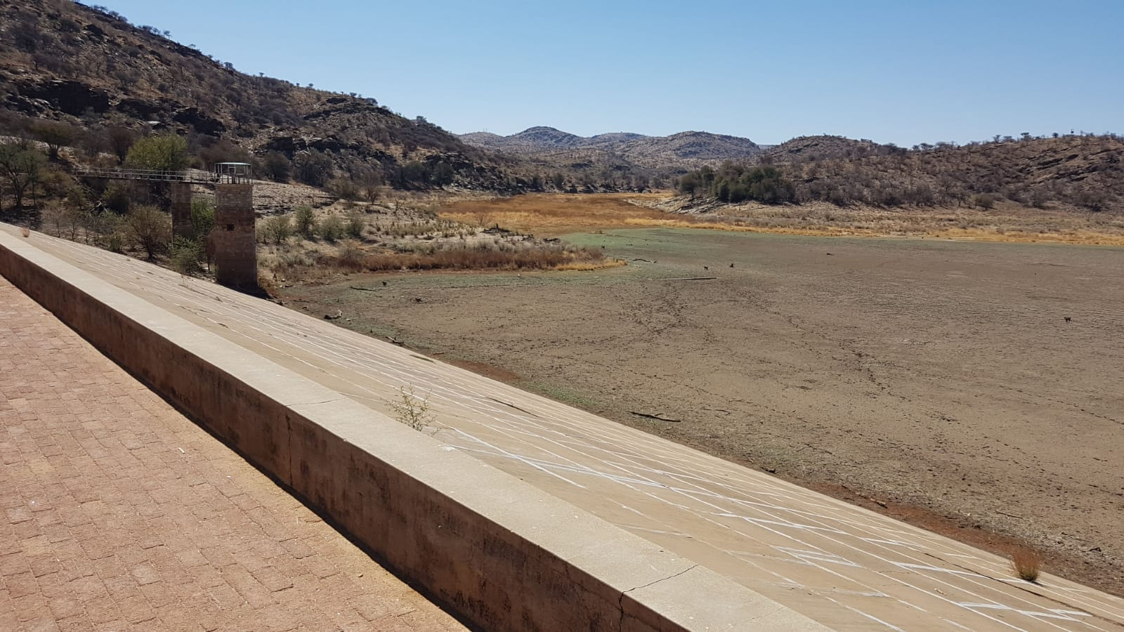 Blick vom Staudamm auf den ausgetrockneten Avis-Stausee